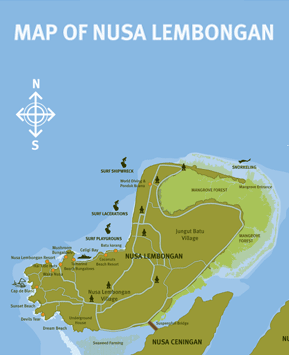 Map of Nusa Lembongan island, Bali, Indonesia